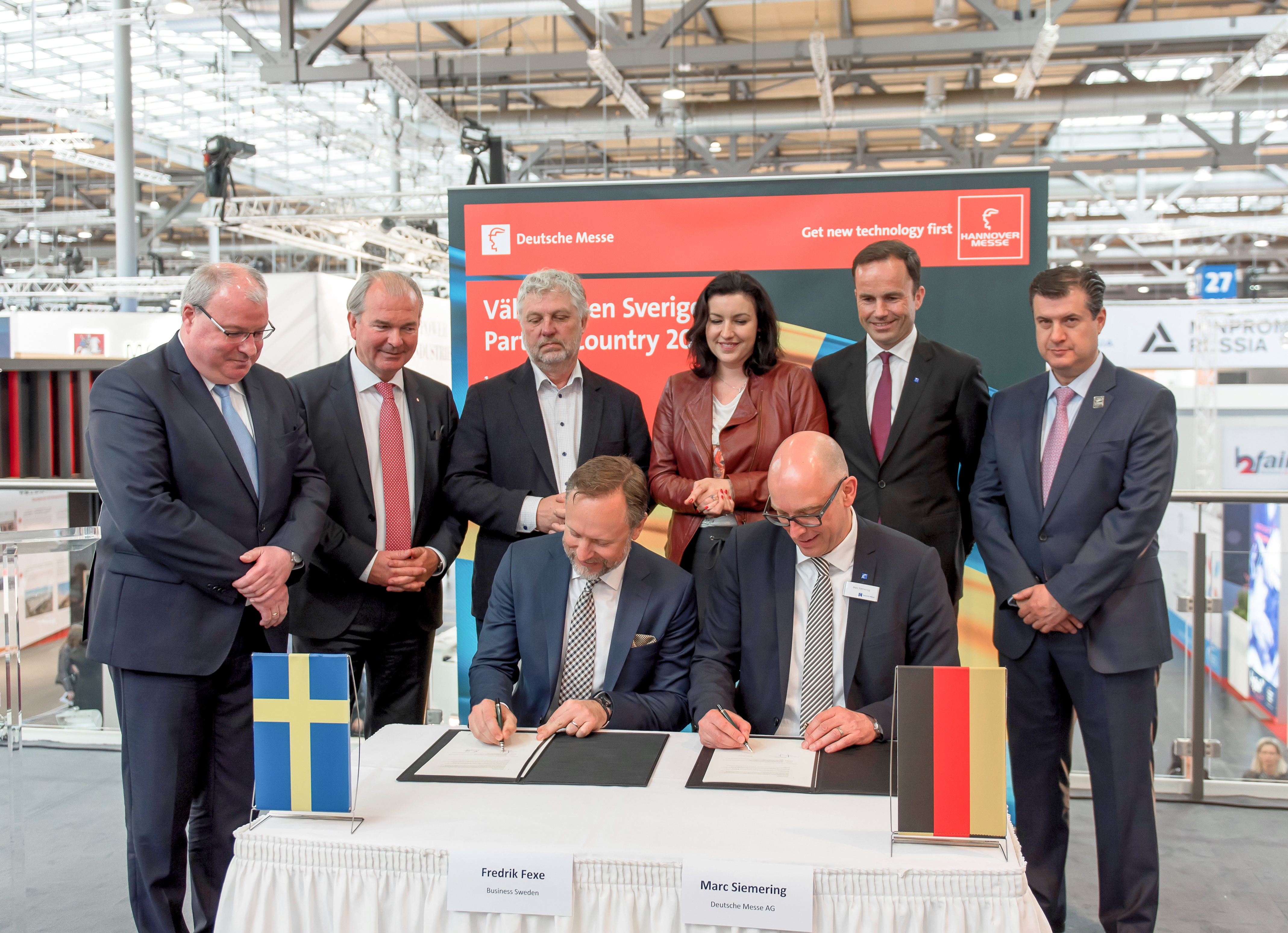 Unterzeichnung des Partnerlandsvertrags 2019 mit Schweden durch Fredrik Fexe (Executive Vice President der Durchführungsagentur Business Sweden) und Marc Siemering (Senior Vice President der Deutschen Messe AG). Im Hintergrung Peter Eriksson und Dorothee Bär